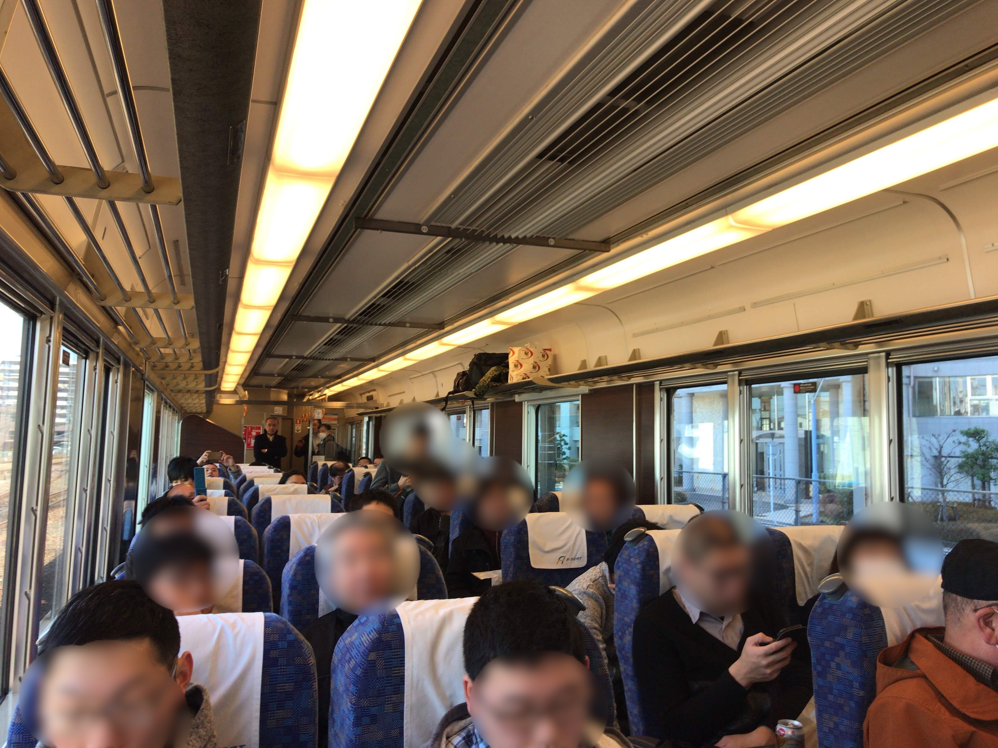 JR西日本、新快速のA-SEATの車内。